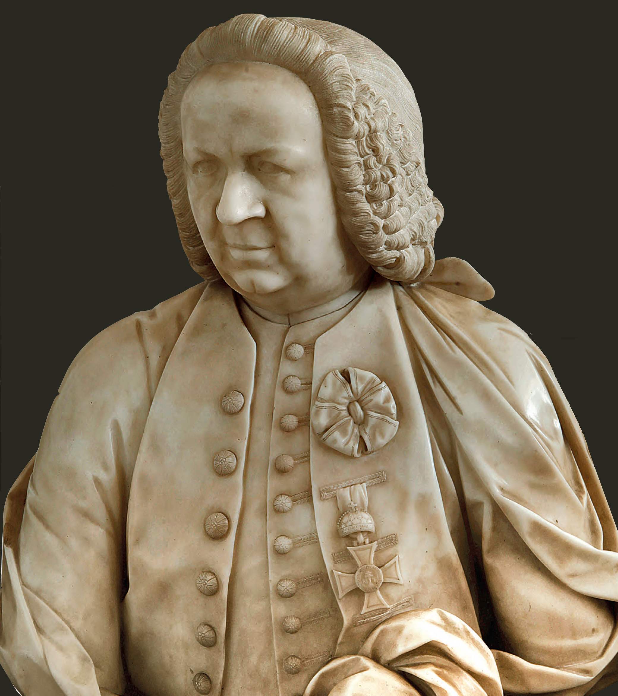 Busto di Pompeo Neri - Giovanni Antonio Cybei, 1772